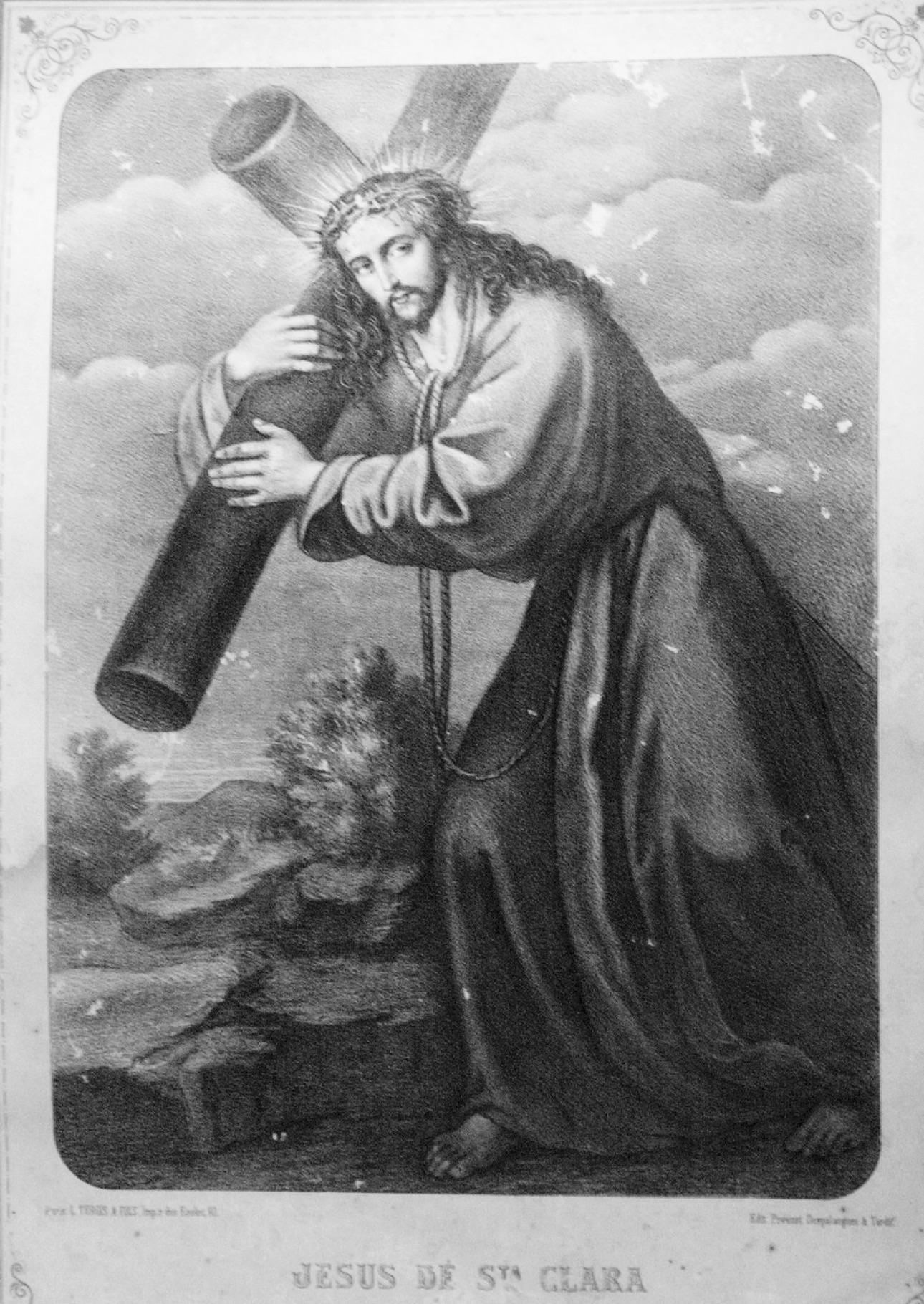 Pintura de Jesús de Santa Clara.